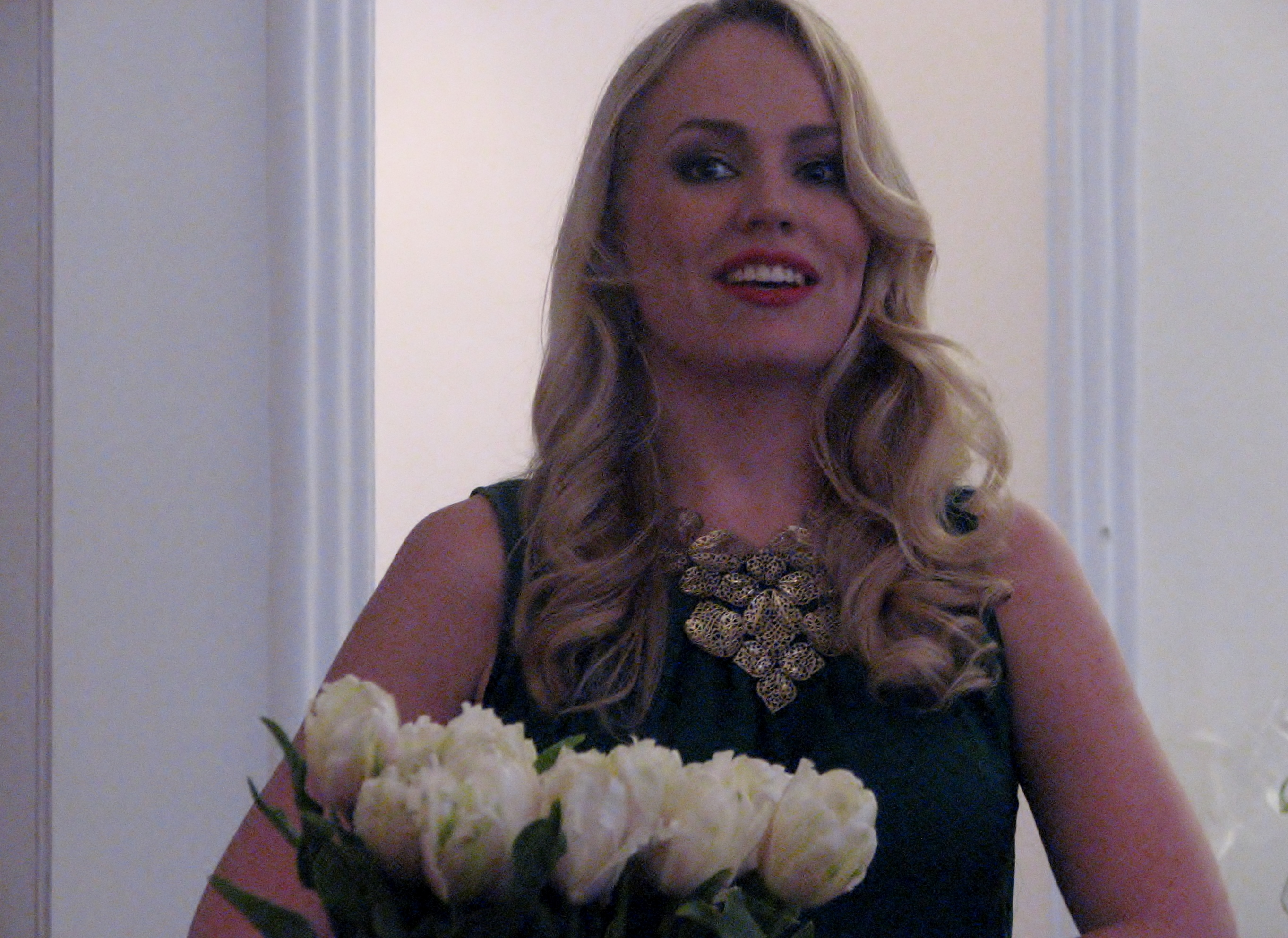 Eia Uus esitlemas St. Olavi Hotelli saalis toimunud Vanalinna Kirjandusklubis raamatut "Minu Prantsusmaa"